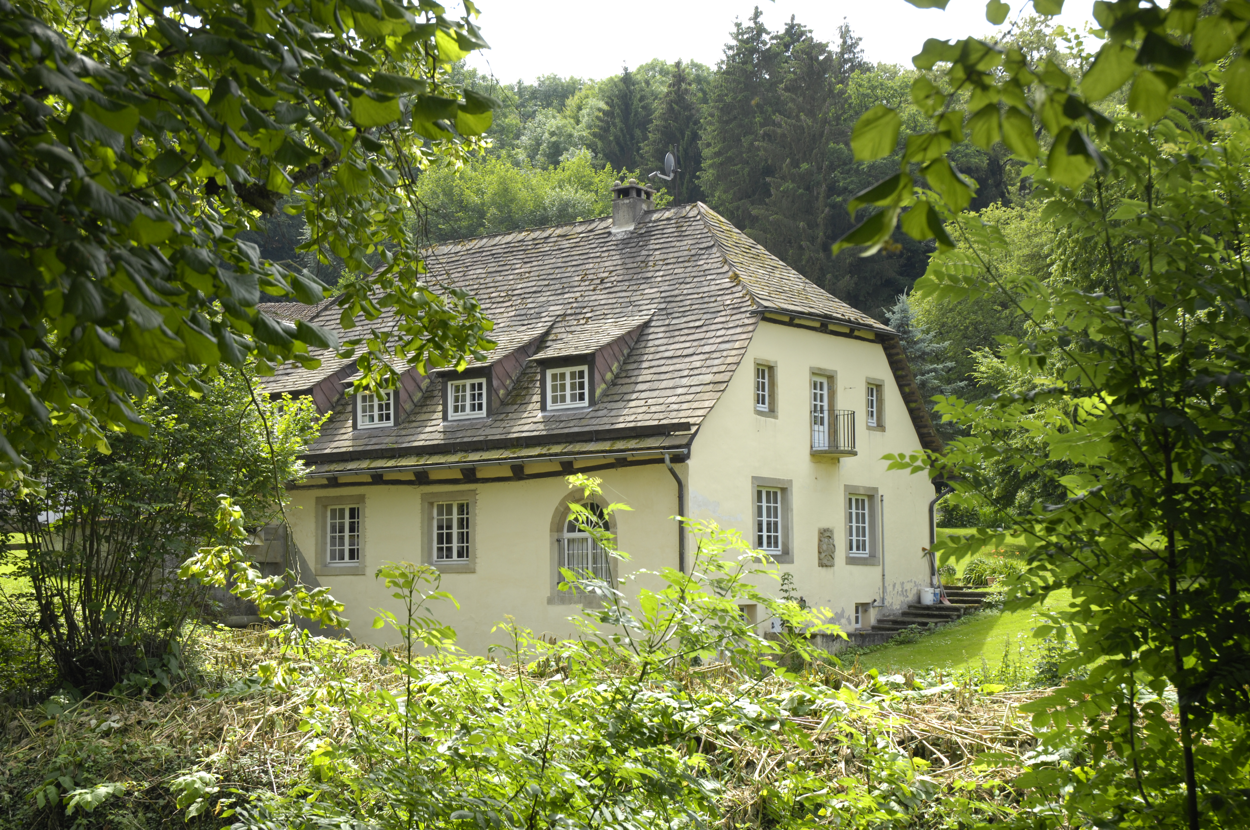 Schloss Rheder, ehemalige Schlossmühle